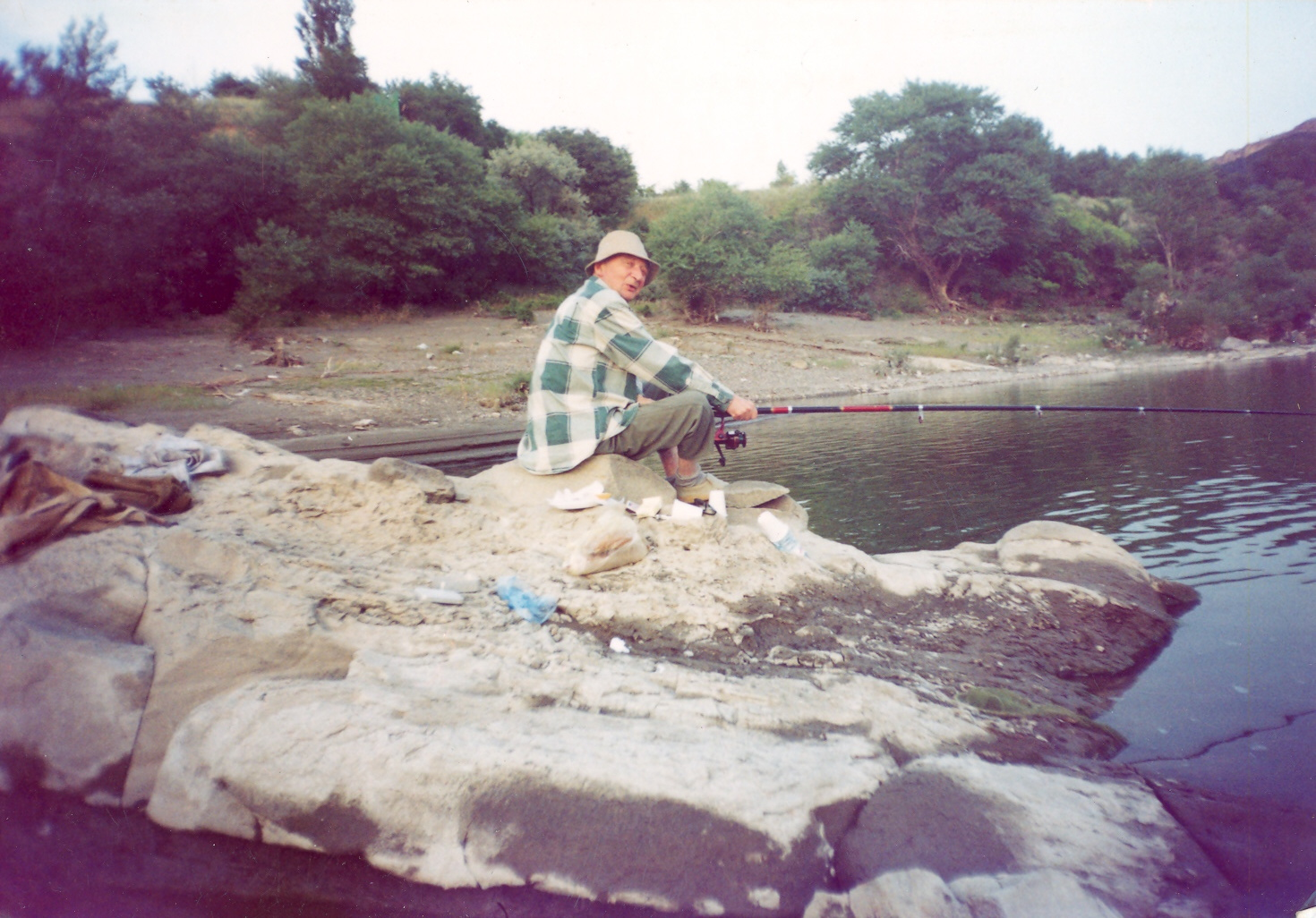 Всеволод Михайлович на одной из своих последних рыбалок.